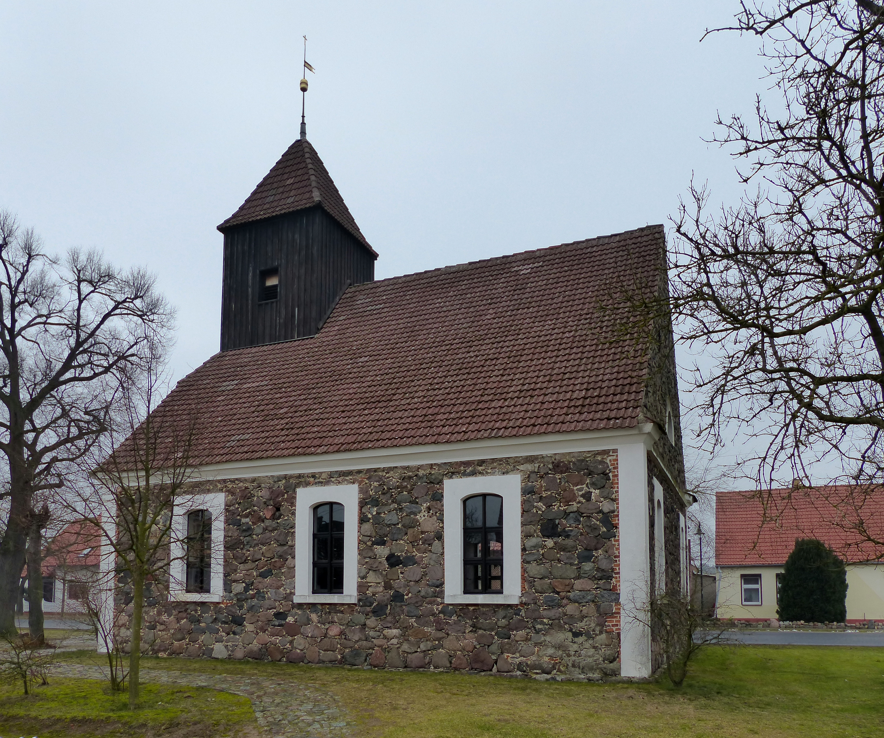 Kirche in Meiersberg, Südeite